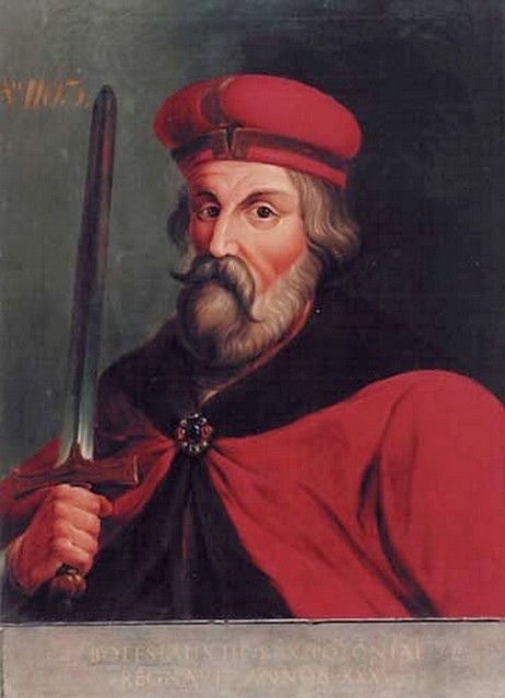 Bolesław Krzywuousty pędzla Jacobiego na podstawie obrazu M. Bacciarellego